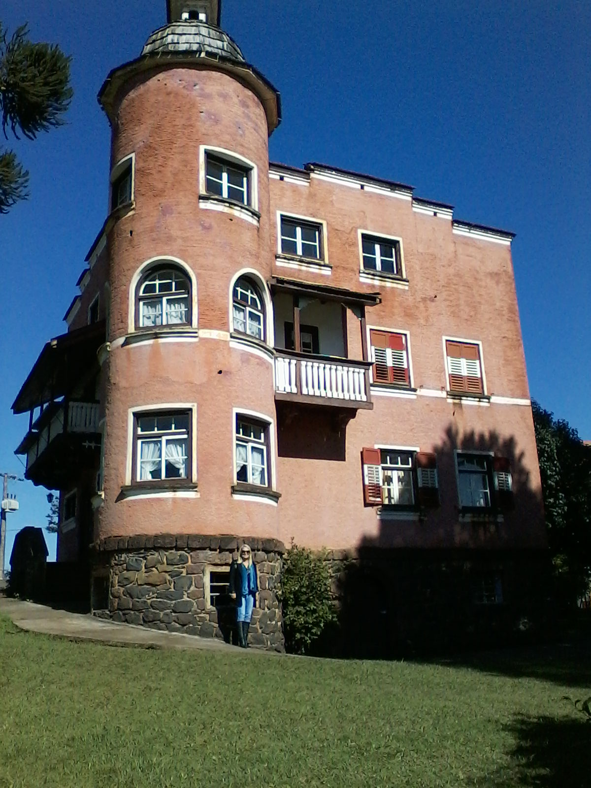 Museu Casa de Andreas Thaler. Treze Tílias, 22 de junho de 2014